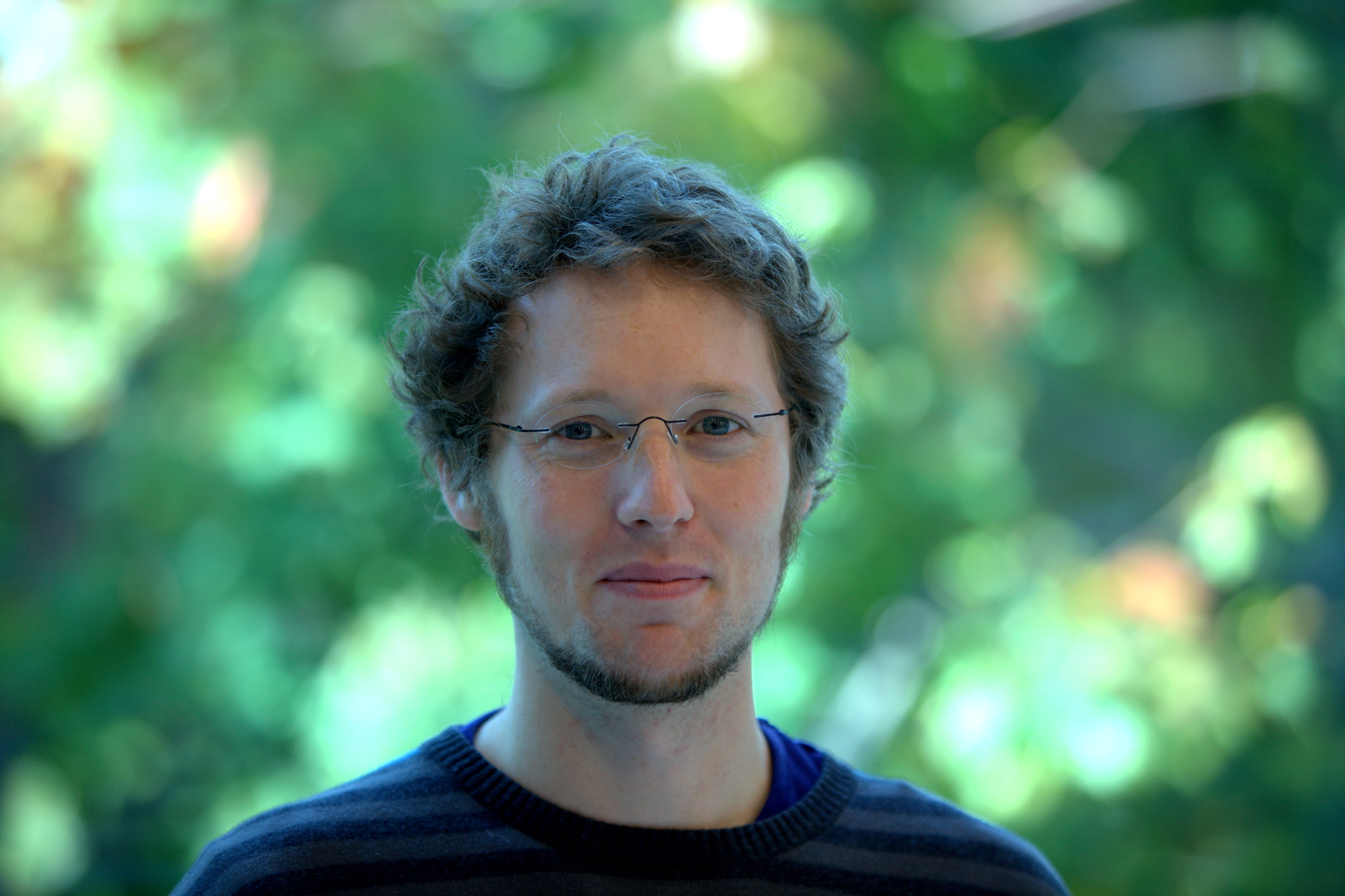 Jan Philipp Albrecht, MdEP auf der netz:regeln-Veranstaltung der Heinrich-Böll-Stiftung